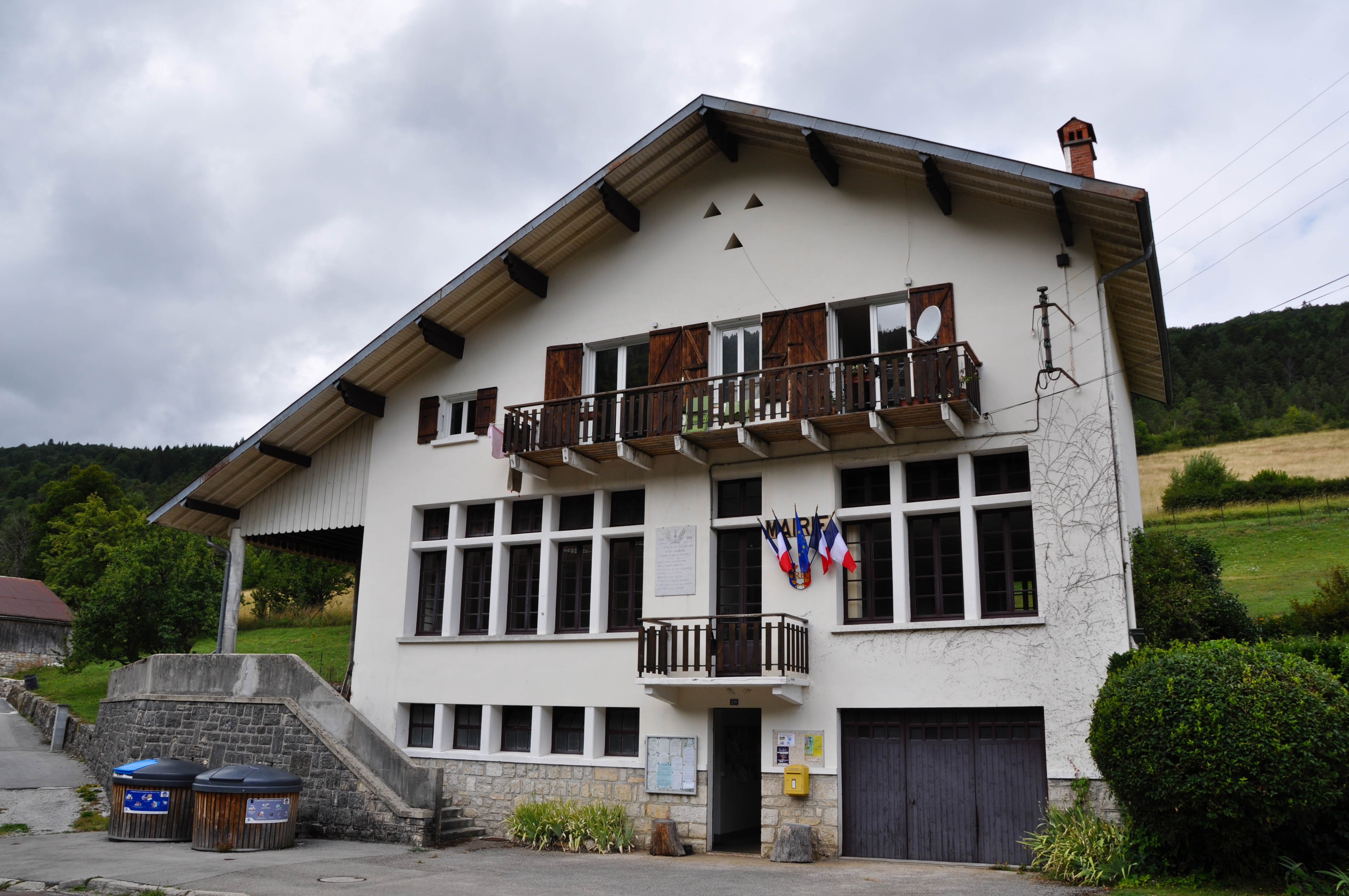 Mairie de Coiserette (Jura, France).